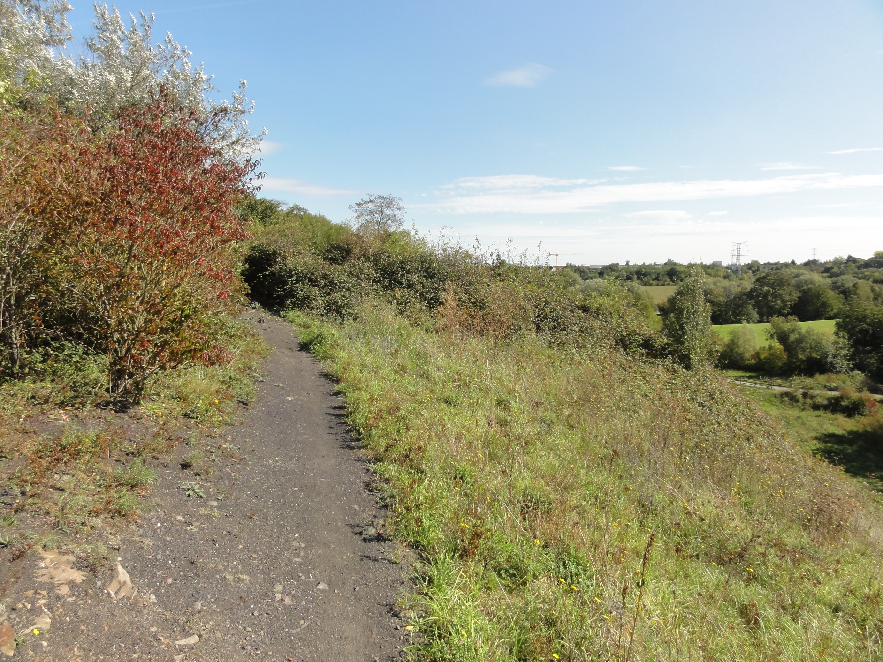 Terril n° 80 dit Abattoir Pont Ampère, fosse n° 3 - 3 bis - 3 ter de la Compagnie des mines de Liévin dans le bassin minier du Nord-Pas-de-Calais, Liévin, Pas-de-Calais, Nord-Pas-de-Calais, France. Le terril no 80 est inscrit sur la liste du patrimoine mondial de l'Unesco le 30 juin 2012 et y constitue en partie le site no 74.